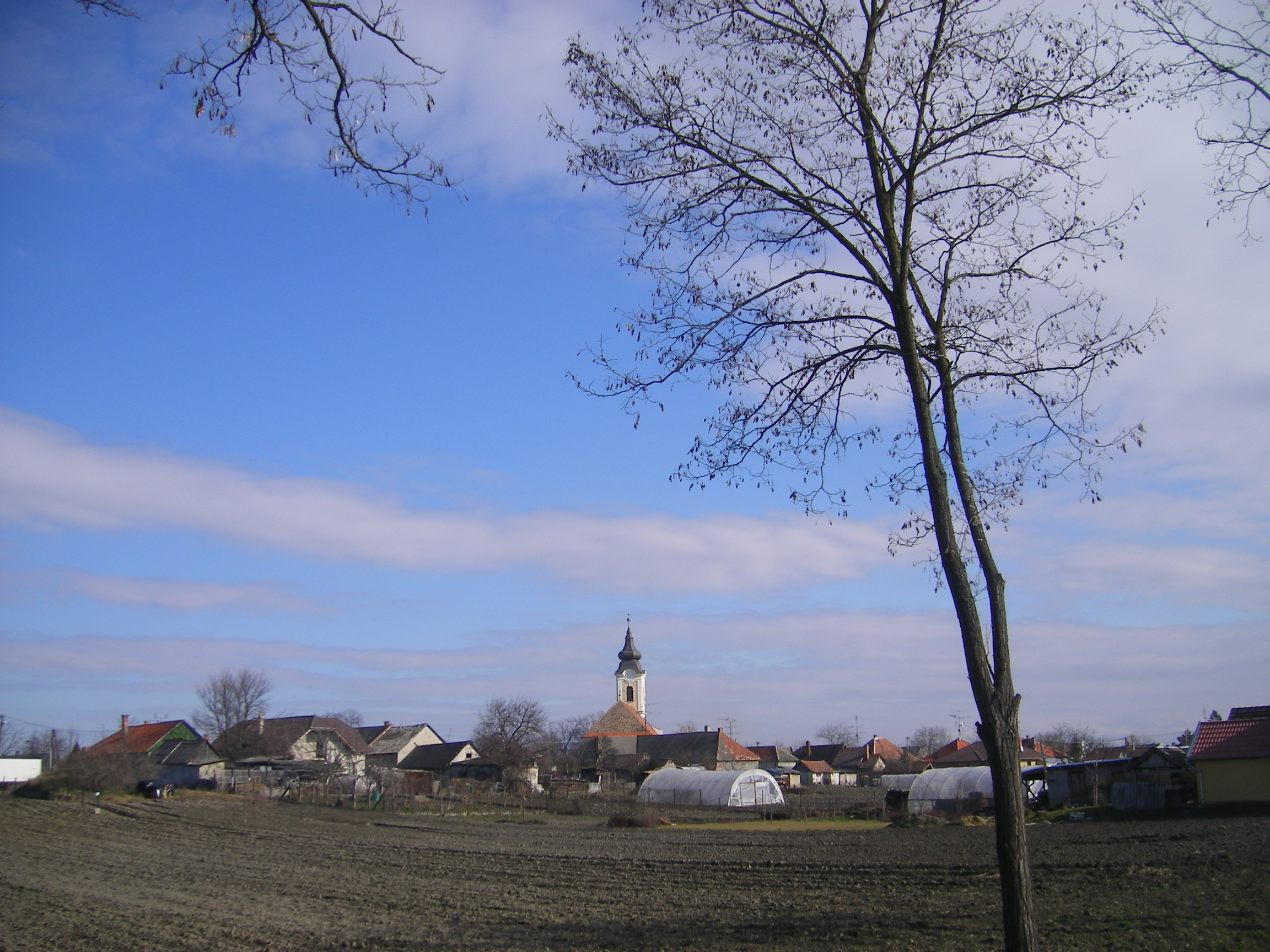 Ekel - látkép a református templommal